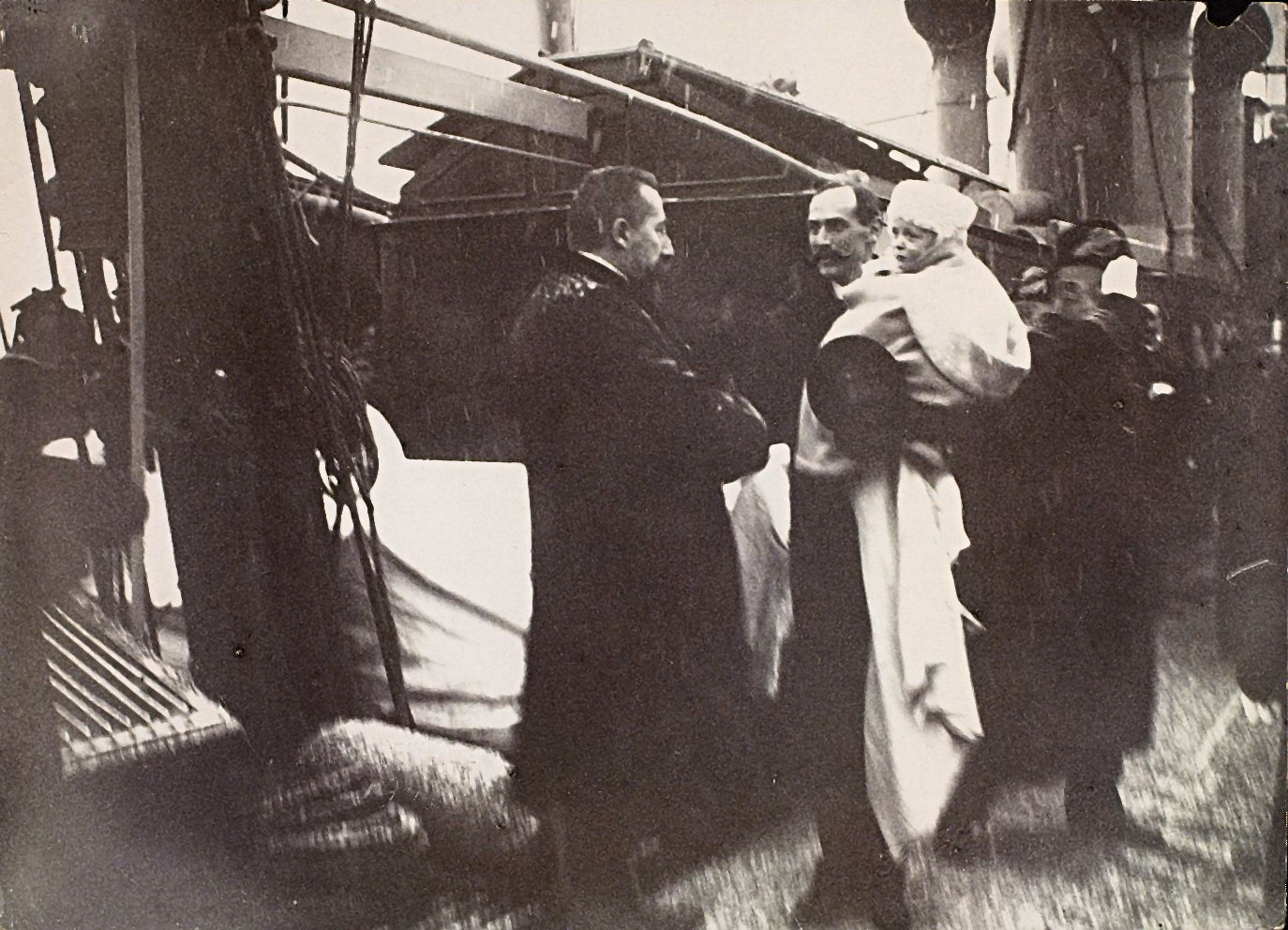 Kong Haakon VII ankommer Norge med Kronprins Olav på armen 1905. Bildet er tatt straks etter at kongen og hans følge har forlatt det danske kongeskipet Danneborg i Drøbaksundet og gått over i K/S Heimdal, et kommandofartøy som seinere ble norsk kongeskip, 25. november 1905. Statsminister Christian Michelsen ønsker velkommen til landet. Heimdal førte så den nye kongefamilien og regjeringa videre inn til Kristiania der følget steig i land ved Akershus festning straks før klokka 13. Tross surt vær og sludd hadde en stor folkemengde møtt fram for å hylle den nye nasjonens folkevalgte regent. (Større, uretusjert kopi) King Haakon VII (formerly Prince Carl of Denmark) upon his historic arrival to Norway with his son and heir apparent, Alexander, renamed Olav V on his arm, in 1905. The photograph is taken immediately after the king and his entourage transferred from the Danish ship Danneborg near Drøbak to the Norwegia ship K/S Heimdal, November 25, 1905. Prime minister Christian Michelsen is greeting the newest Norwegians to their new home country and realm. United with his cabinet, the king continued his voyage to Kristiania where they went ashore near Akershus fortress just before 1 pm. In spite of bad weather, a large crowd was waiting for them. The young prince's blanket is in fact light blue. (larger, unretouced photo)